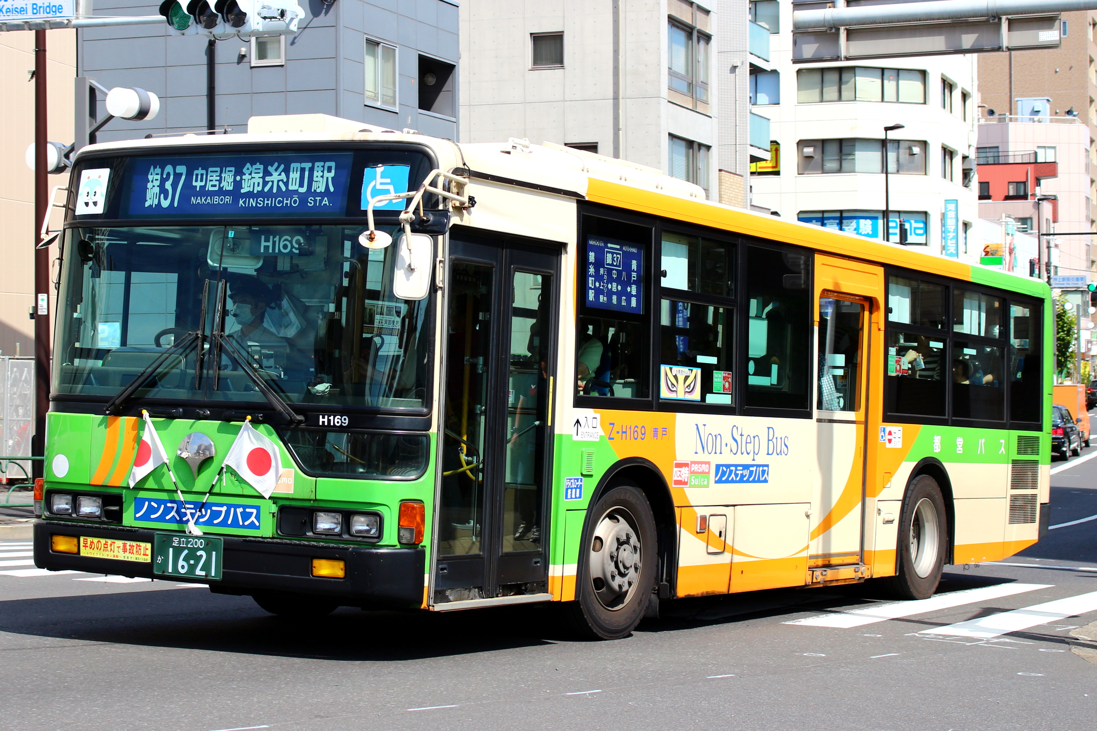 錦37系統錦糸町駅行き(幕車)